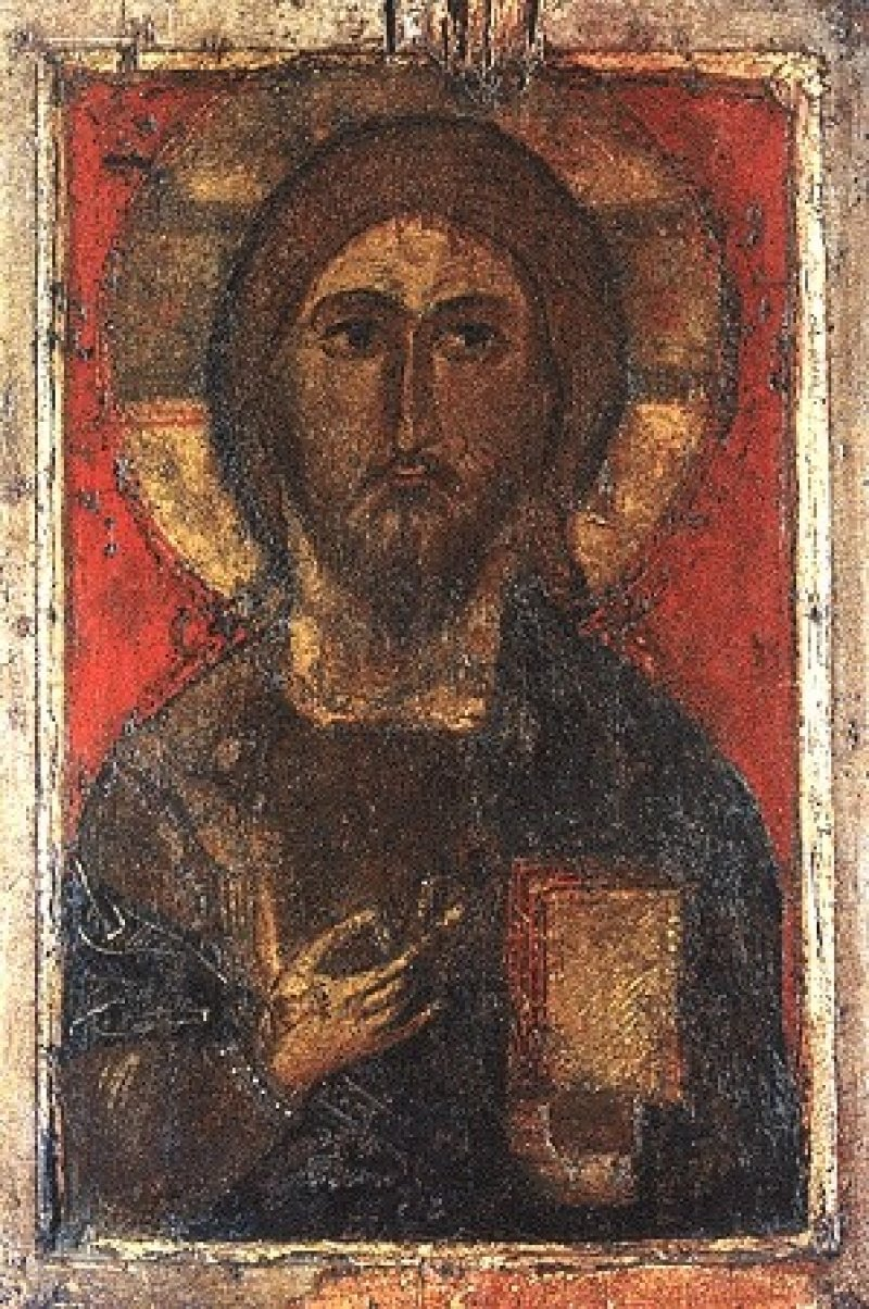 Спас Елеазаровский, псковская икона